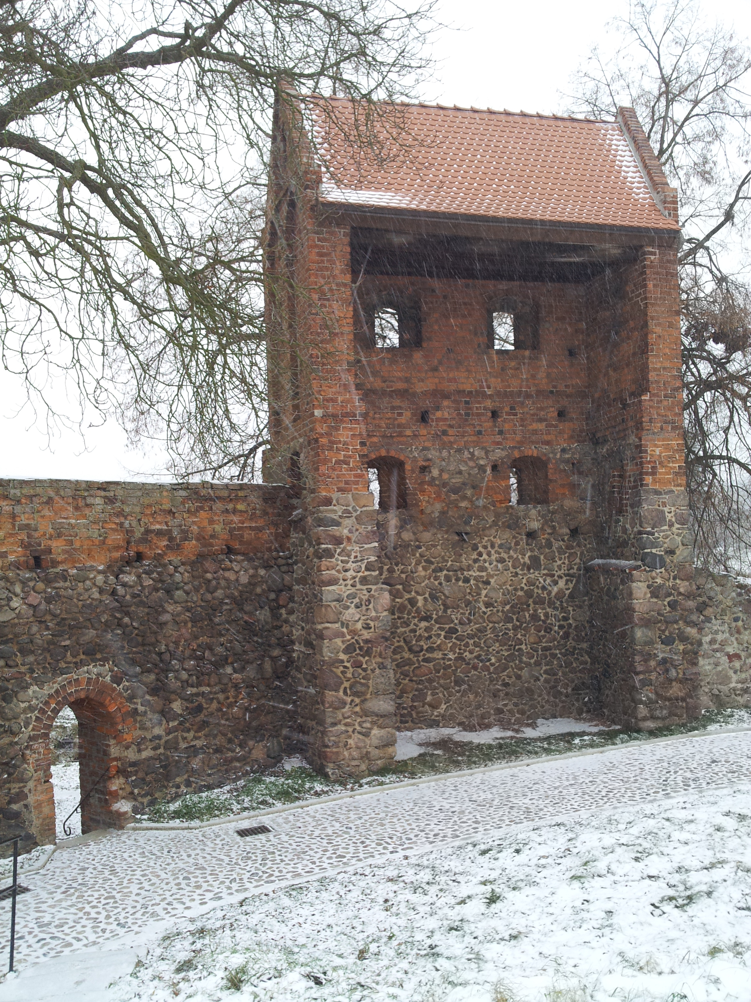 Baszta Wielka Chyżańska (Czatownia)